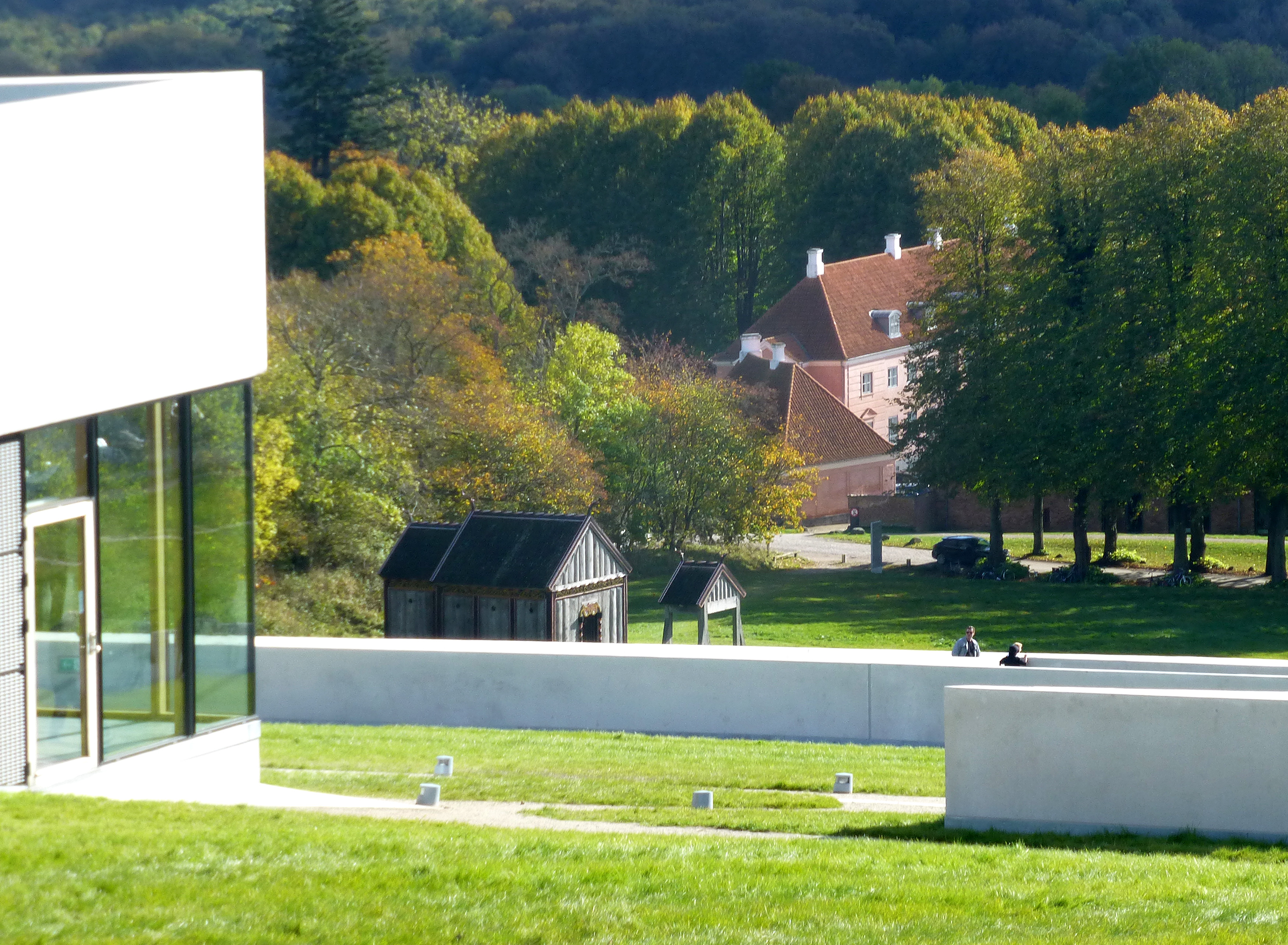 Herregården Moesgaard og rekuntruktionen af Hørning Kirke set fra taget